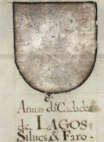 Aspecto das Armas lisas da cidade de Silves conforme figura no Thesouro da Nobreza antes da reforma, motivo que levou os autarcas a solicitar uma reforma do escudo